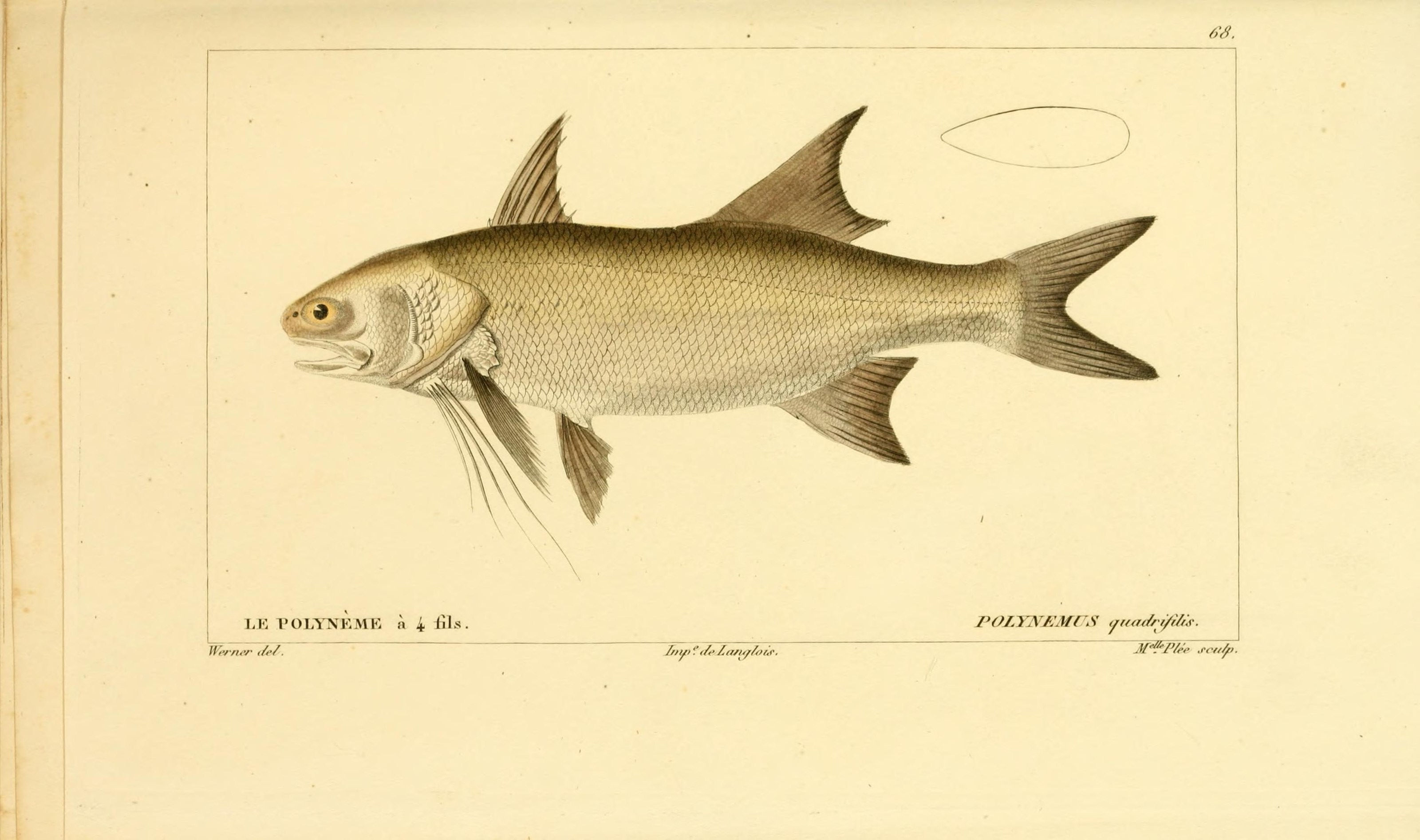 Polydactylus quadrifilis syn. Polynemus quadrifilis